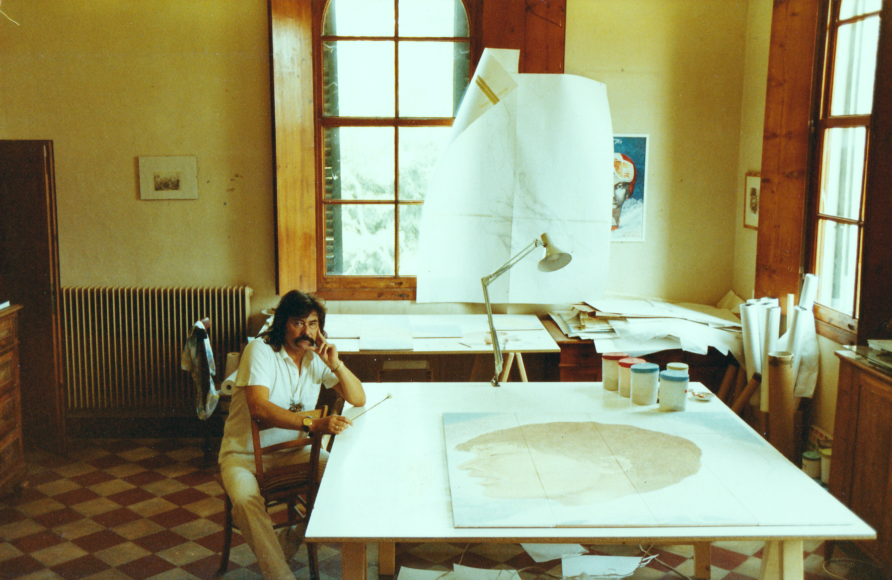 Leherb in Italy